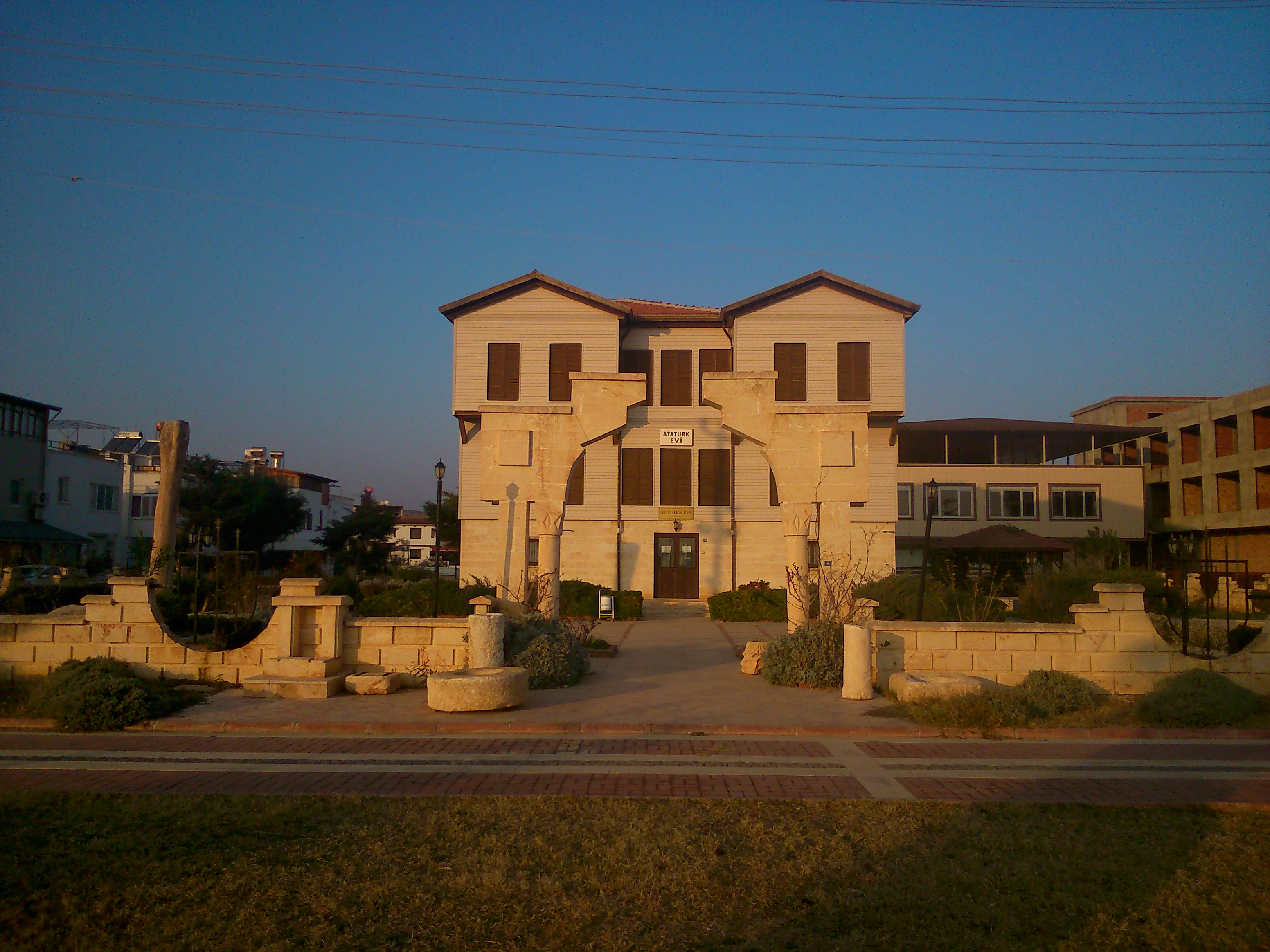 Mersin'in Silifke ilçesine bağlı Taşucu beldesinde bulunan Taşucu Atatürk Evi.